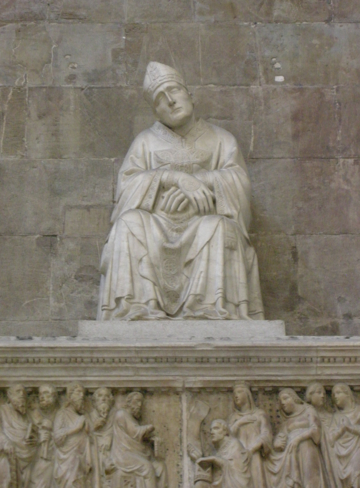 Smf, tomba antonio dell'orso by tino di camaino